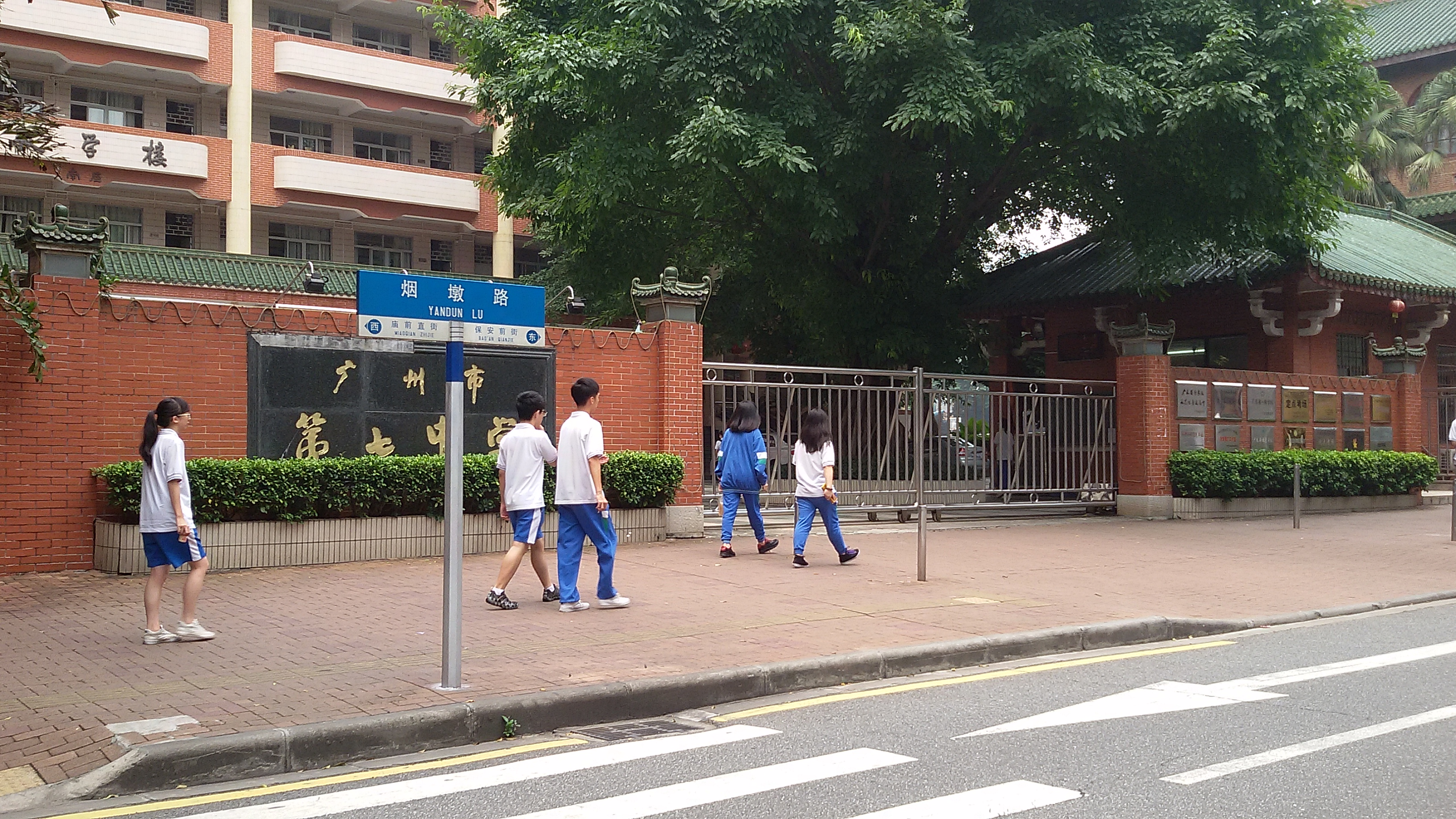 粵語: 廣州市第七中學同埋煙墩路嘅路牌